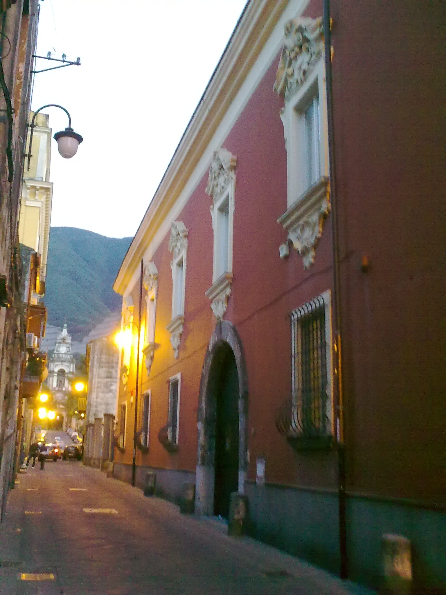 Borgo Vescovado, Nocera Inferiore